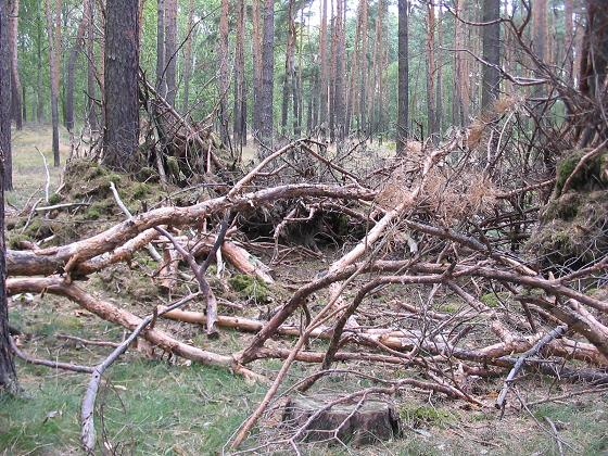 Totholz in Brandenburg Naturpark Nuthe-Nieplitz, Weg Dobbrikow-Wittbrietzen Selbst fotografiert, August 2004